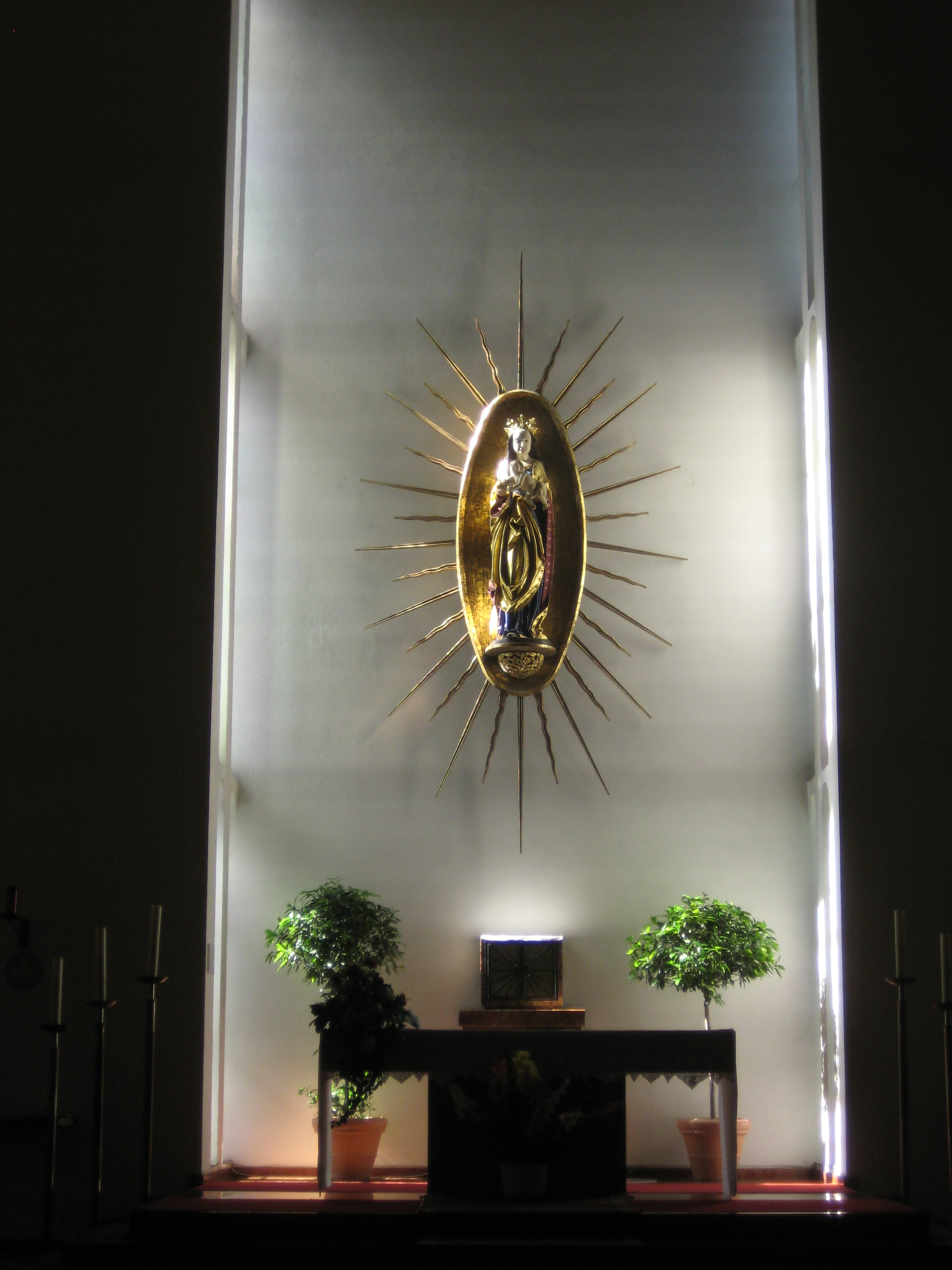 Kath. Pfarrkirche, Wallfahrtskirche, ""Maria an der Straße"" und Pfarrhof